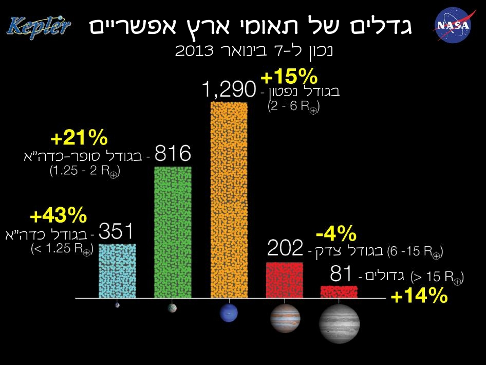 תרשים המתאר את תפרוסת הגדלים של כוכבי הלכת החוץ שמשיים שנמצאו באמצעות טלסקופ החלל קפלר. יחידת המידה היא רדיוס כדור הארץ (Re), והאחוזים בצהוב מתארים את הגידול במספר כוכבי לכת אלו מינואר 2012 עד ינואר 2013. התרשים מתורגם לעברית מתוך אתר נאס"א.